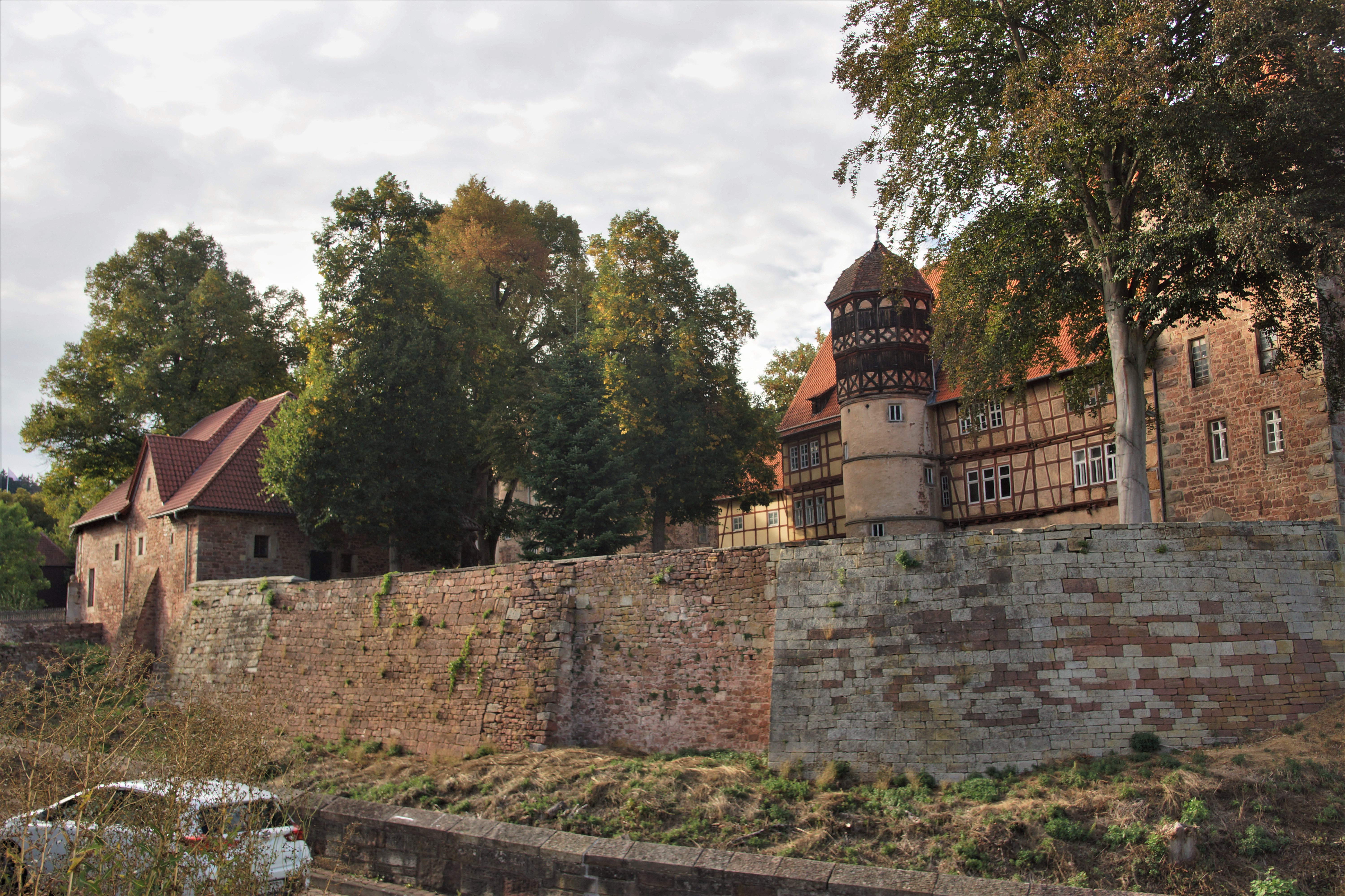 Burg Buchenau